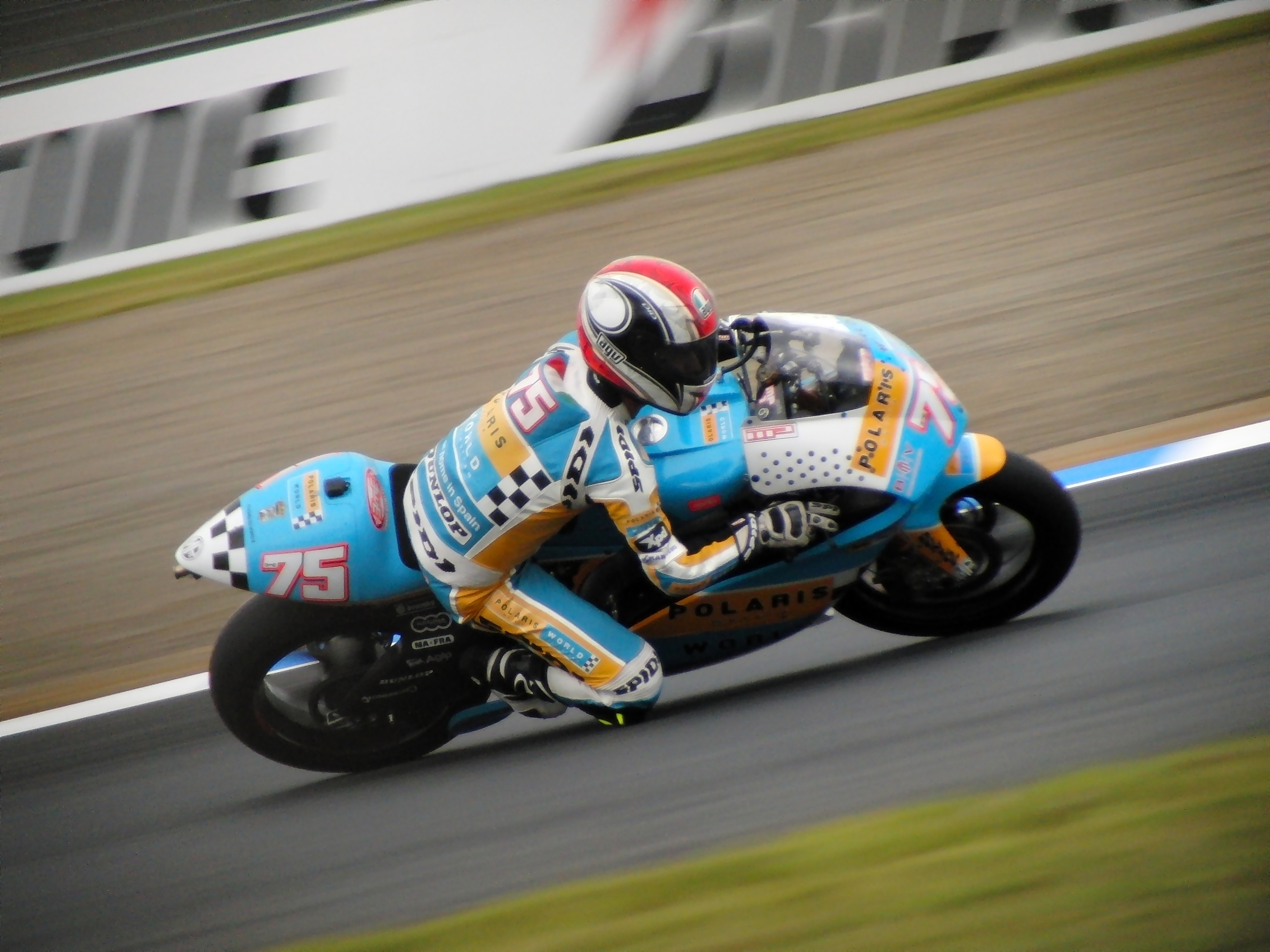 Mattia Pasini a Motegi nel 2008